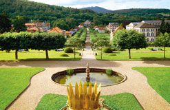 Staatsbad Panorama